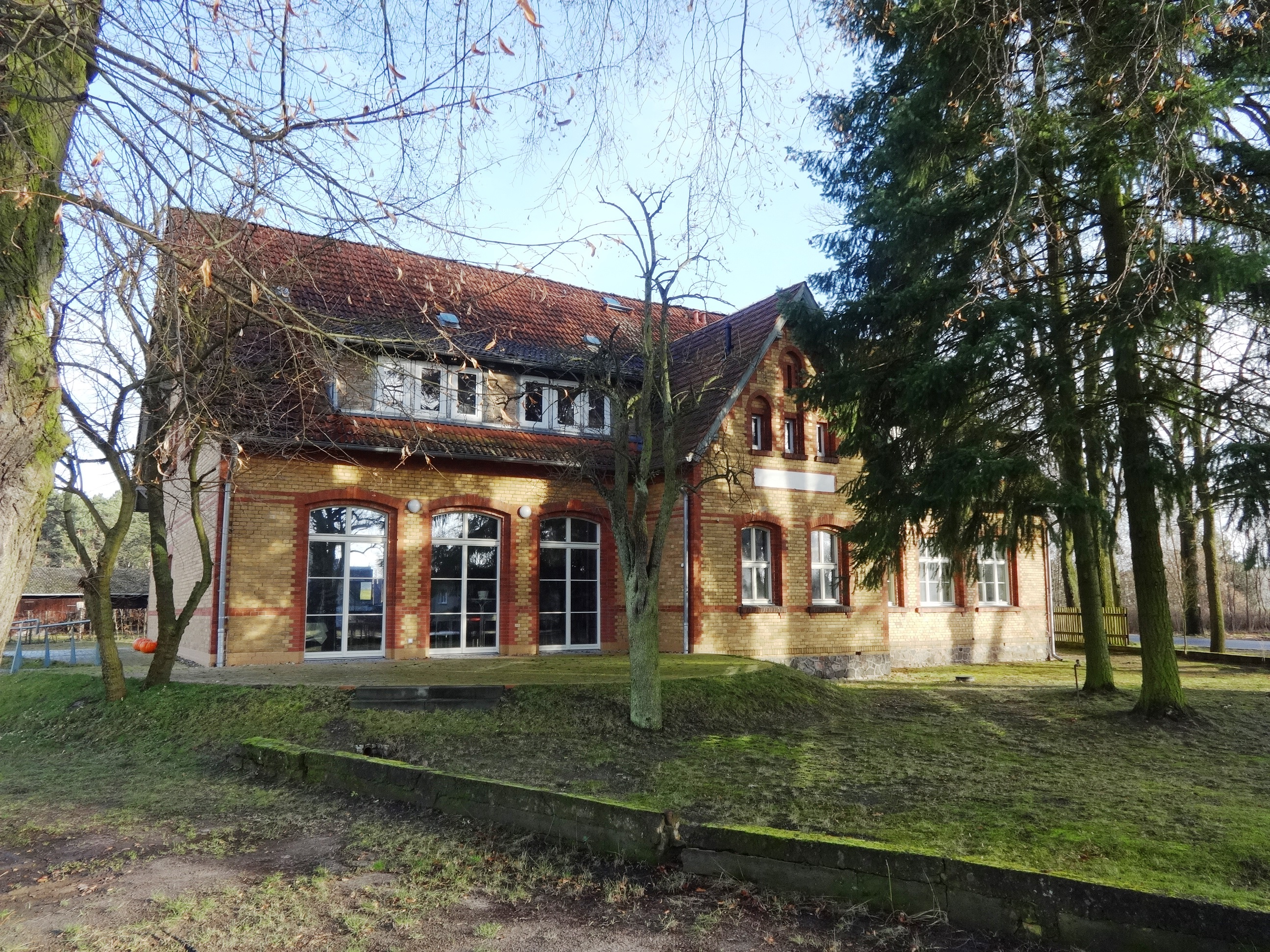 Franz-Fühmann-Begegnungsstätte, ehemalige Schule